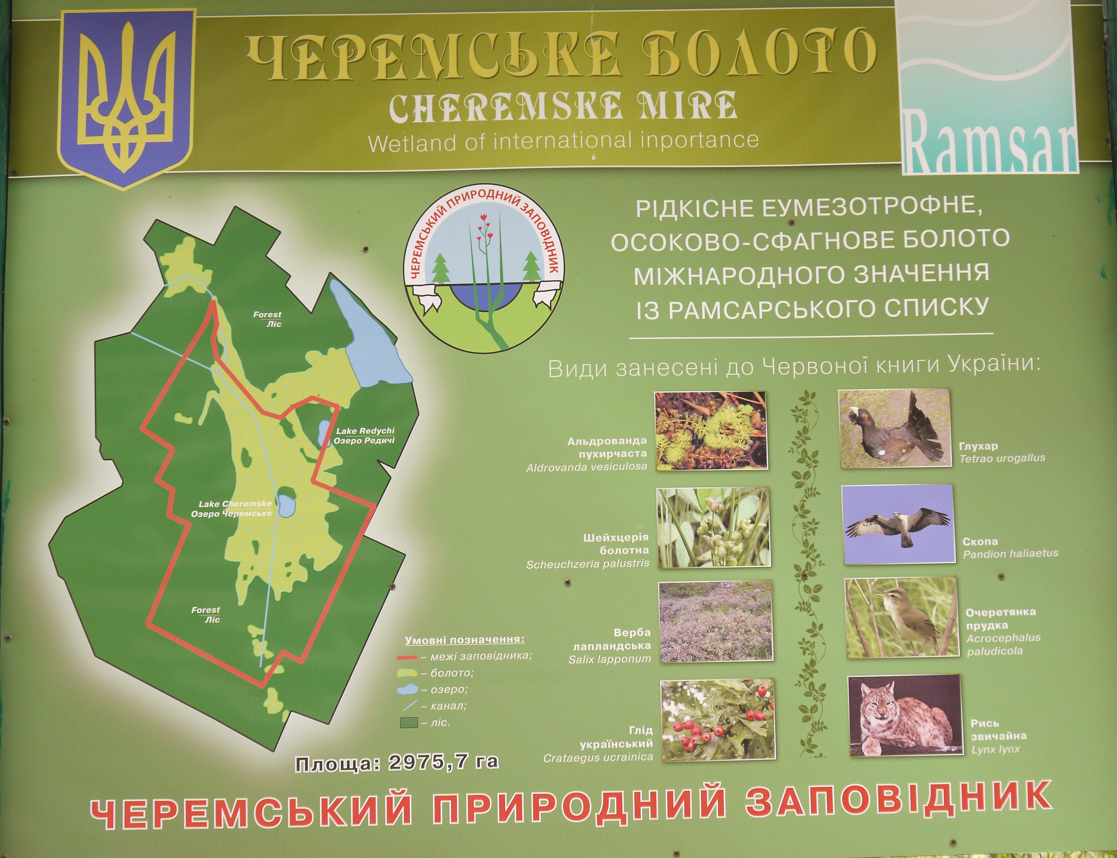 «Черемський», Маневицький район, Черемський природний заповідник